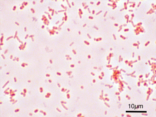 microscopic image of Salmonella enterica serovar Typhimurium (ATCC 14028). Gram staining, magnification:1,000